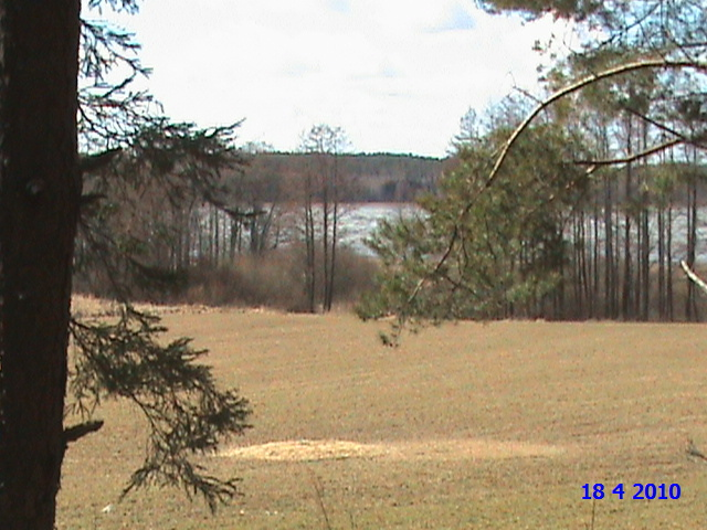 Maisemakuva Velkalan maarekisterikylän aurinkoisemmalta puolelta.